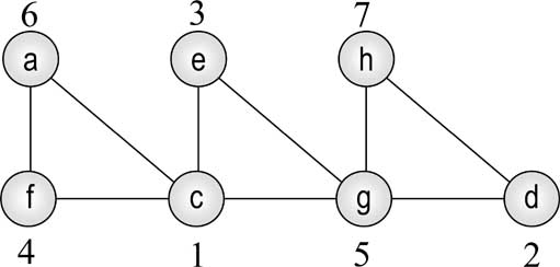 selbst gemacht